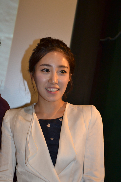 아나운서 최희